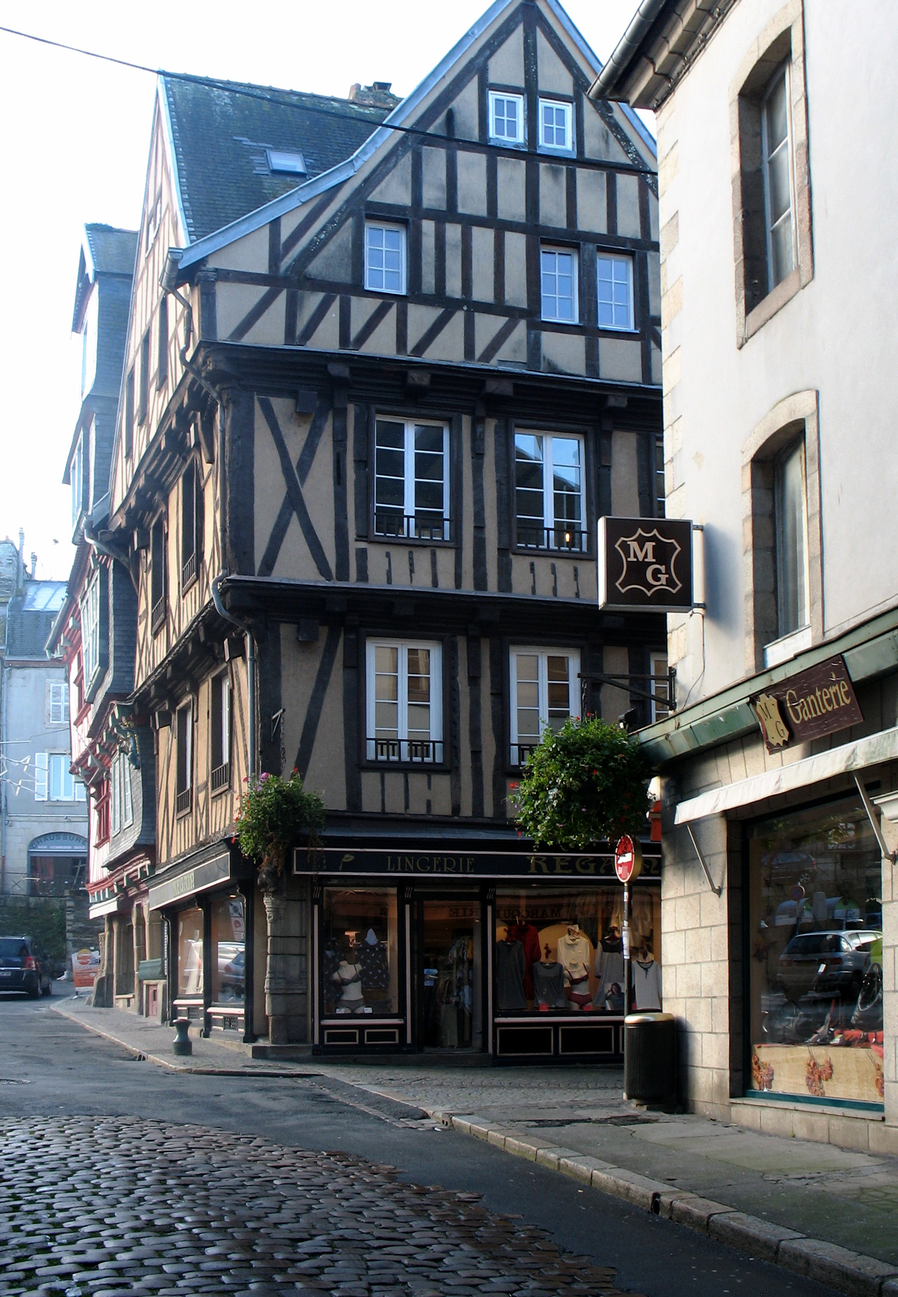 Centre-ville de Morlaix, Finistère (France)